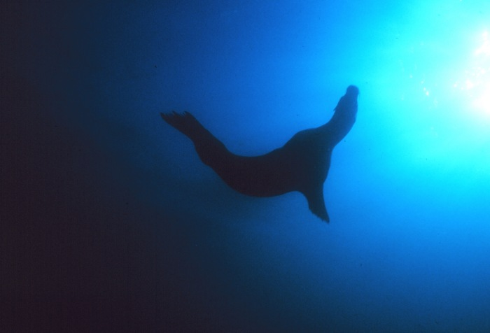 Unterwasserfotografie eines Kalifornischen Seelöwen Ort: Monterey Bay National Marine Sanctuary